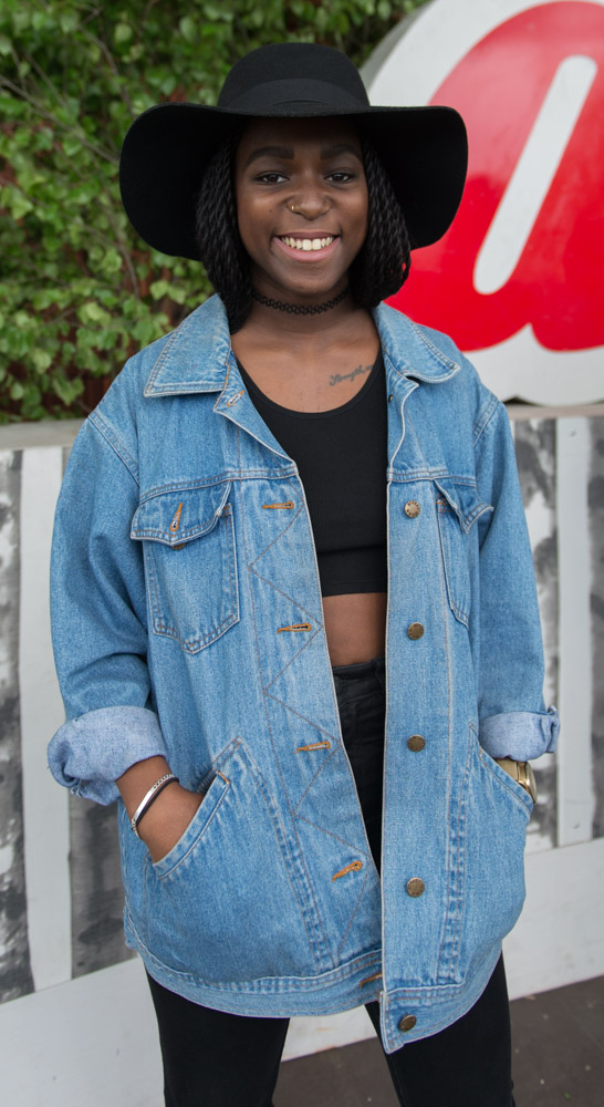 Sabina Ddumba, en av artisterna för Allsång på Skansen presenteras den 10 juni 2015 på Skansen i Stockholm.